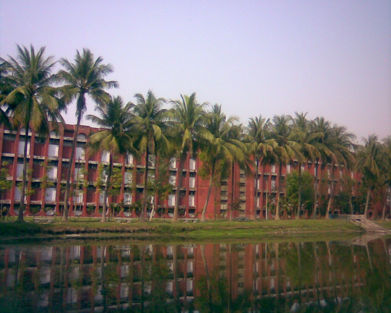 Rajshahi University, Rajshahi, Bangladesh.